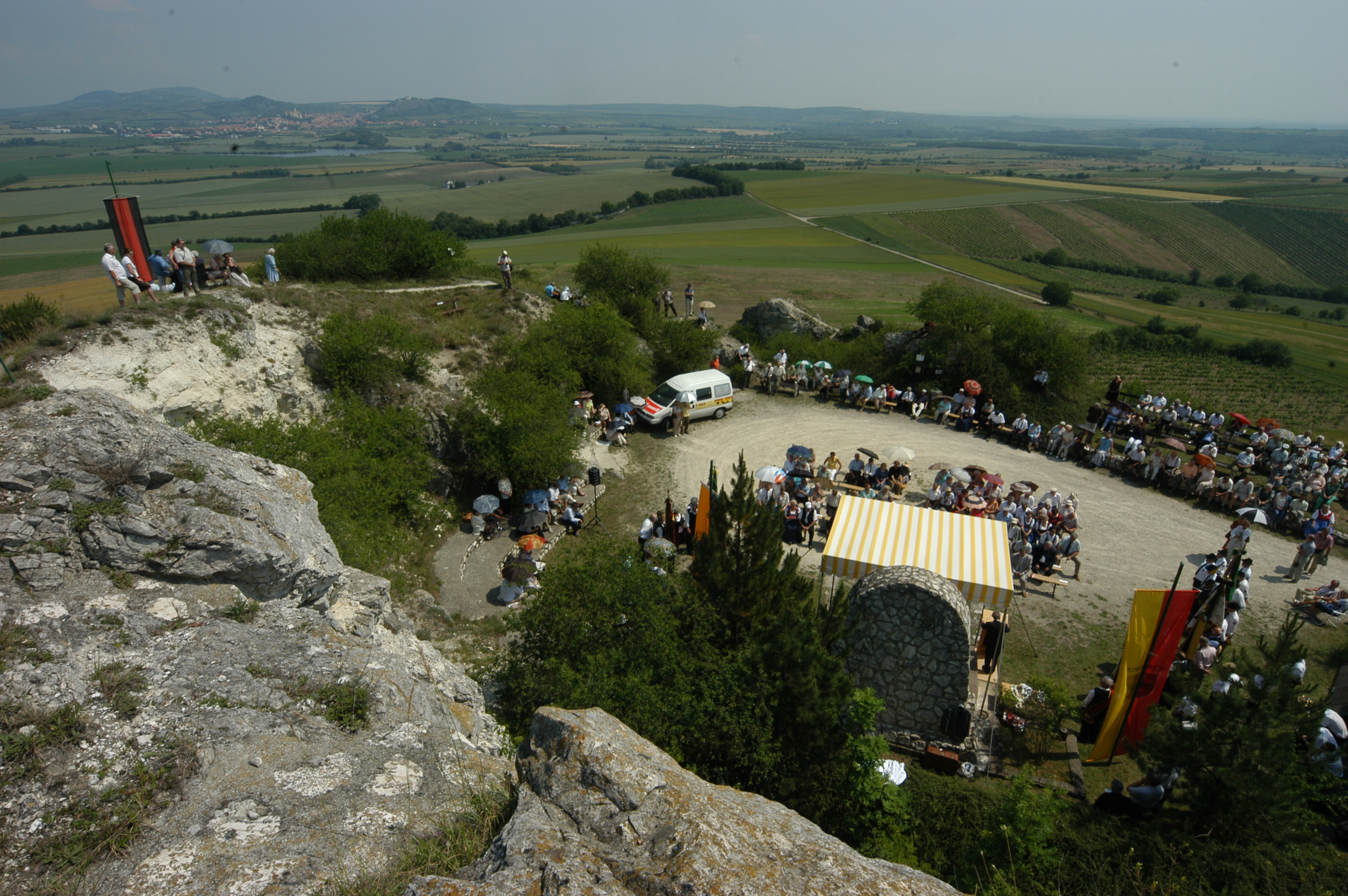 Kreuzbergtrreffen der heimatvertriebenen Südmährer in Kleinschweinbarth in Niederösterreich (2007)